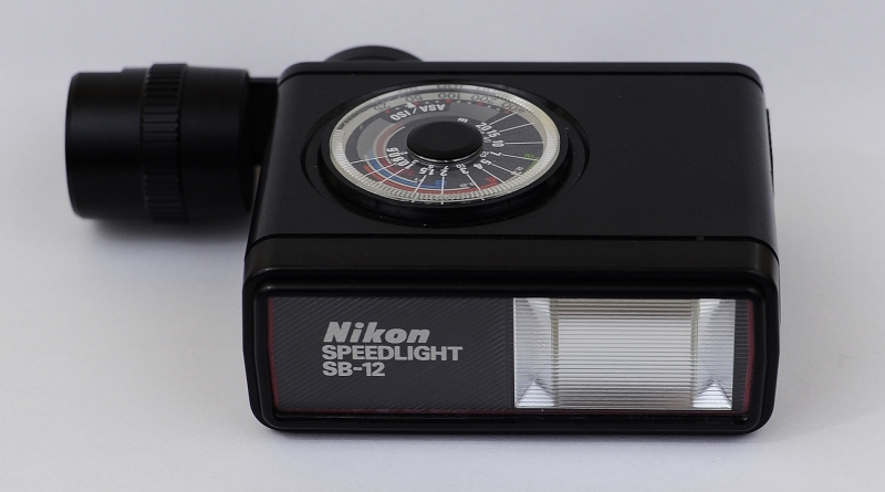 Blitzgerät Nikon SB-12